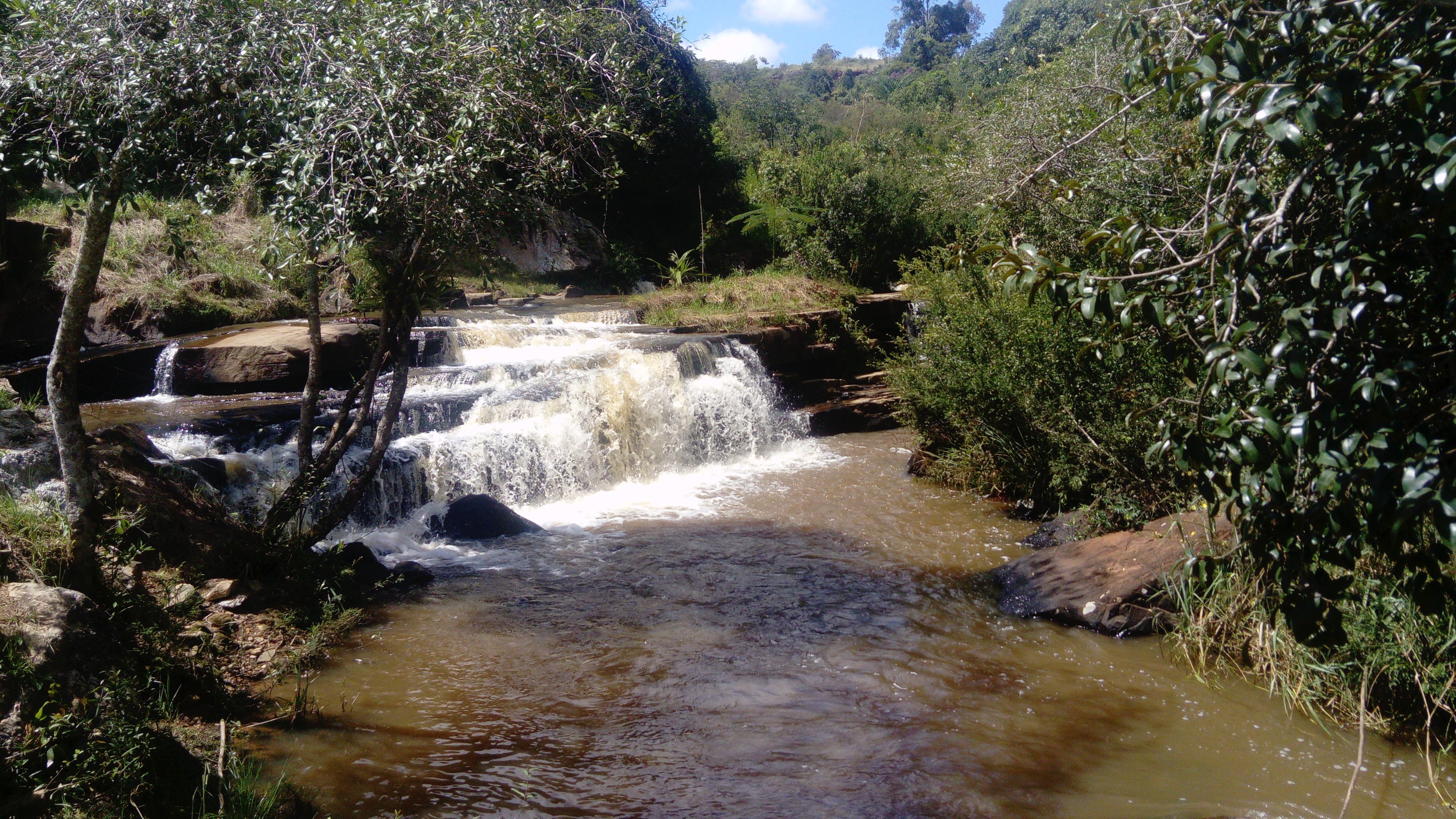 Cachoeira da Usina em Nova Resende Minas Gerais.